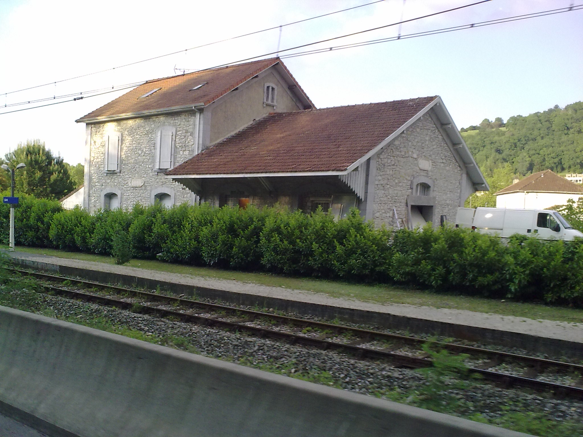 Gare de Gan le 24 mai 2010.